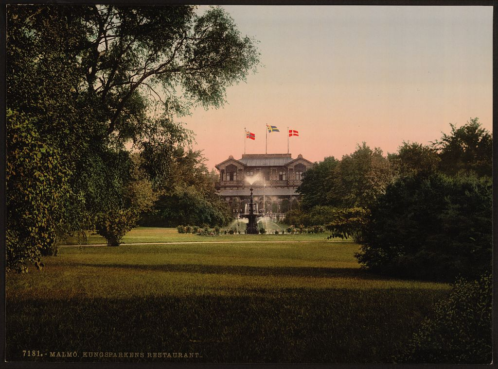 Kungsparkens restaurang, Malmö. Invigd 1881. Arkitekt John Smedberg